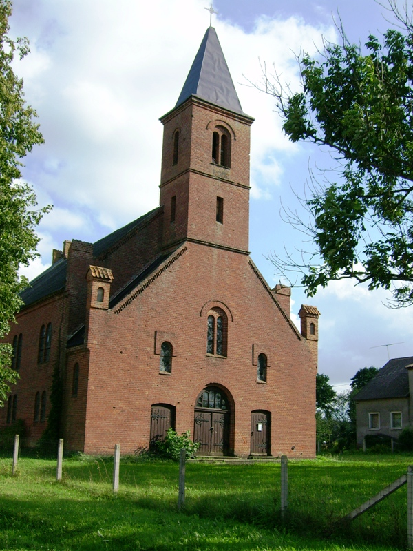 Lauksargiai. Liuteronų banyčia.